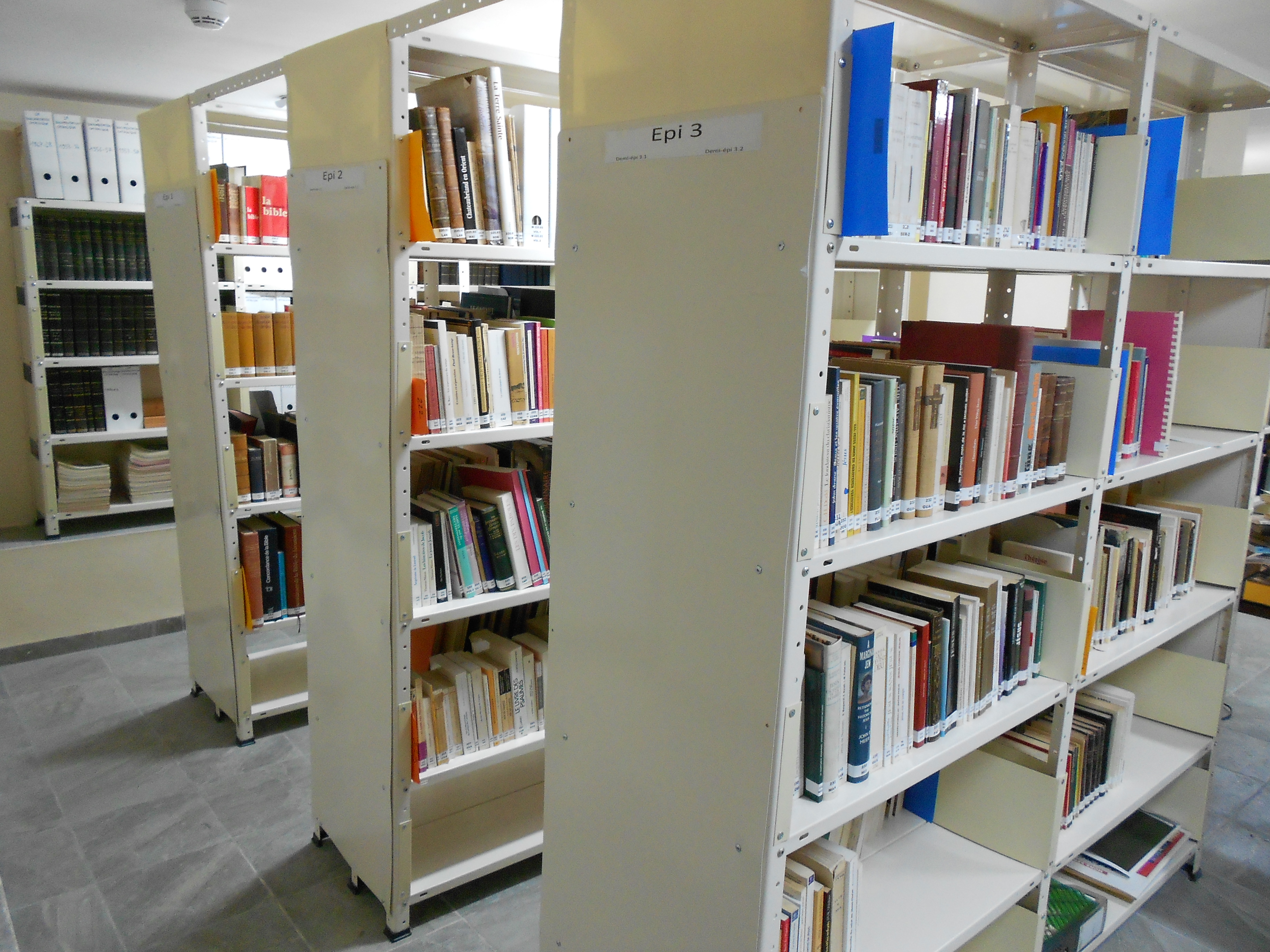 Image sur la page de garde du rapport "Bibliothèque de la communauté assomptionniste : saisie informatique et classement Dewey"